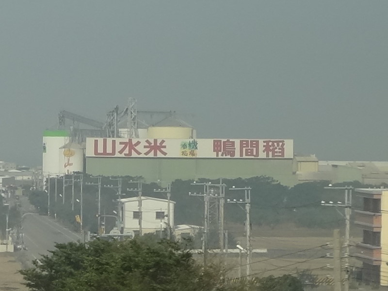 泉順食品與山水米實業總部，位於苗栗縣苑裡鎮玉田里91之1號。拍攝於臺灣高鐵南下列車內。